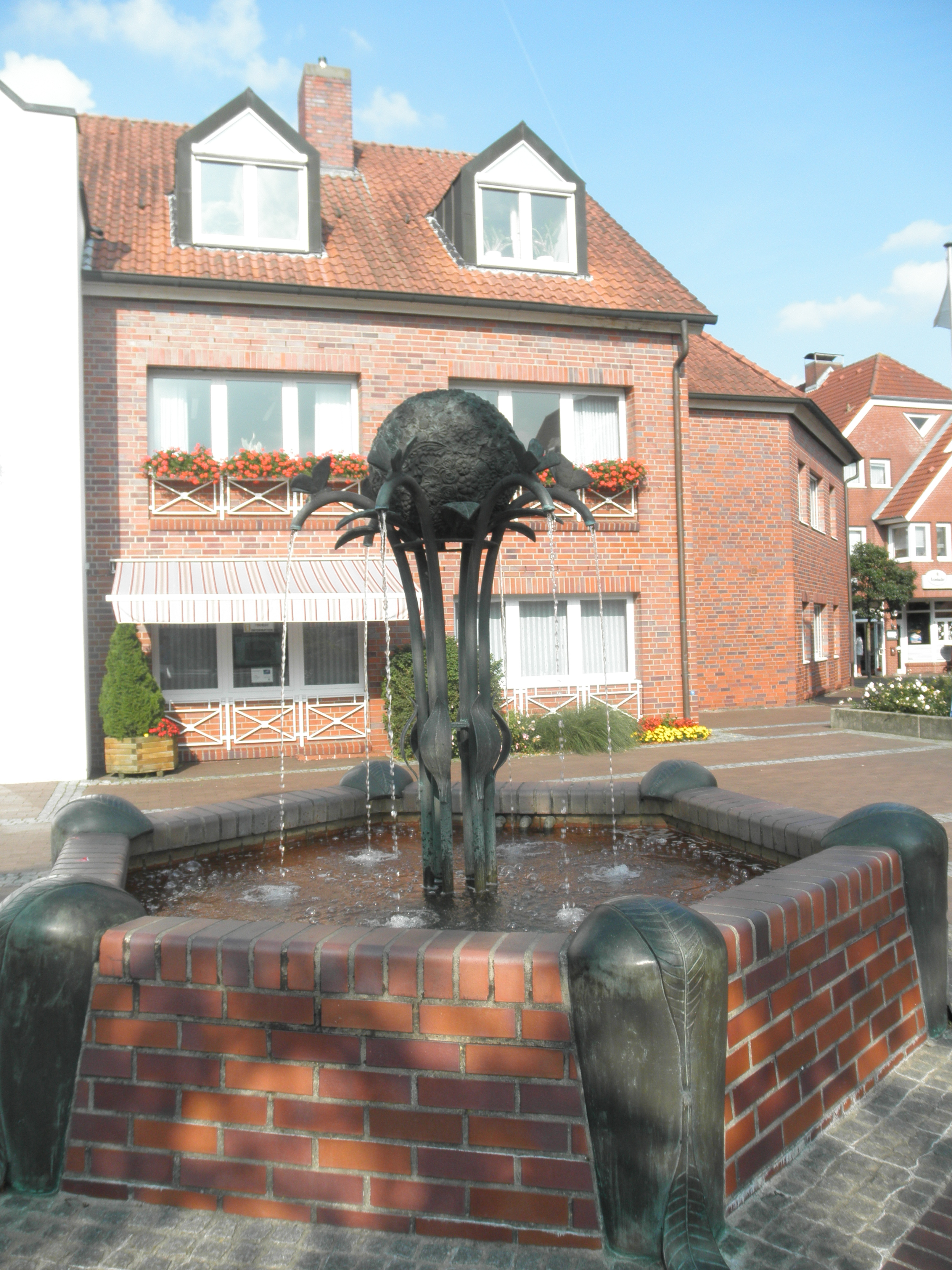 urbodoma fontano en Herzlake, Germanio